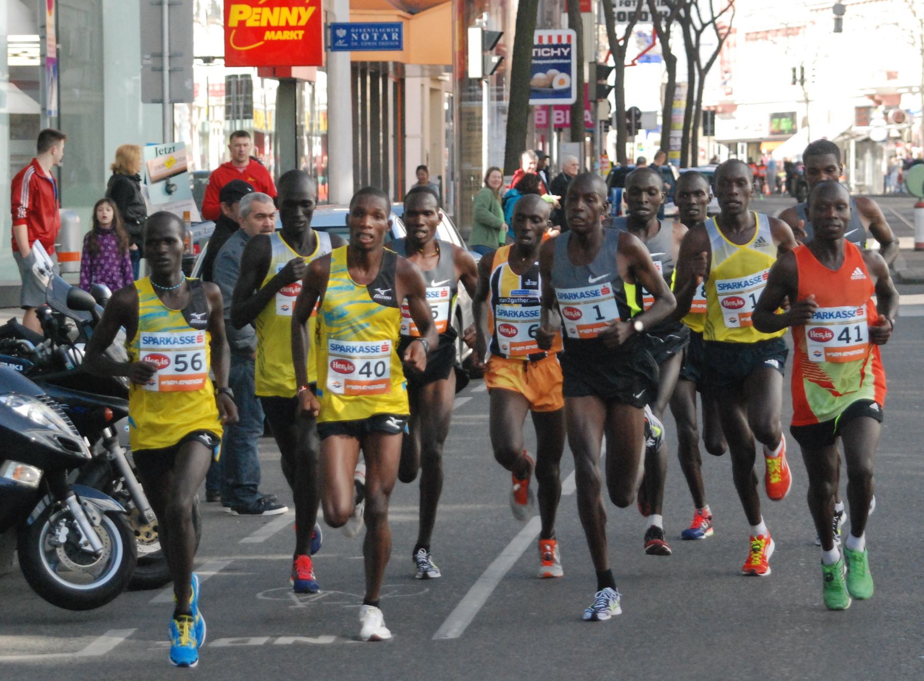 John Kipsang, 40Victor Kipchirchir, Henry Sugut und Charles Kimeli beim Vienna City Marathon 2013 auf der Mariahilfer Straße im 15. Wiener Gemeindebezirk